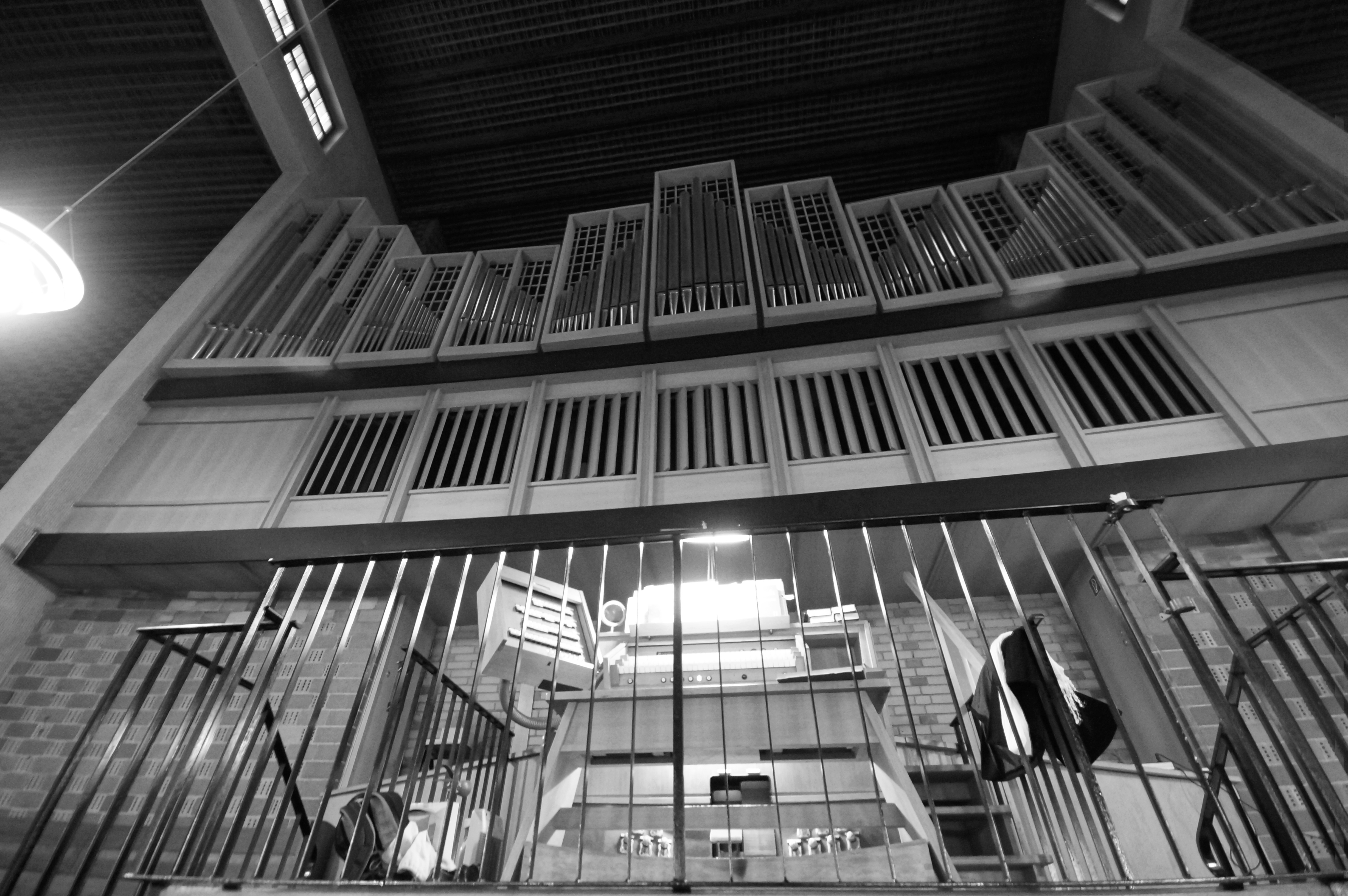 Zu sehen ist die Kleuker Orgel der Gustav-Adolf-Kirche in Berlin.